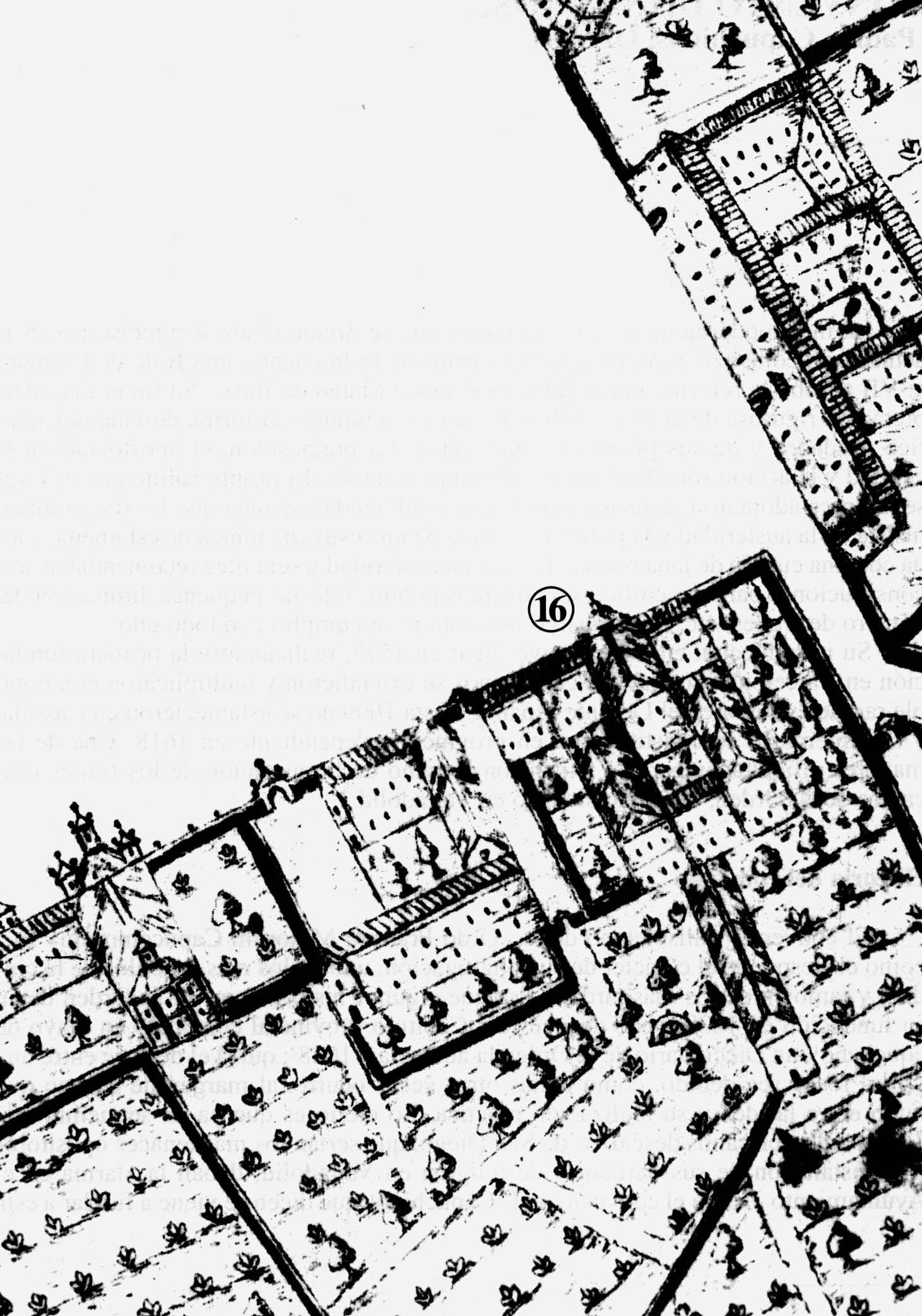 Valladolid (España). Sección del plano de Ventura Seco de 1738.